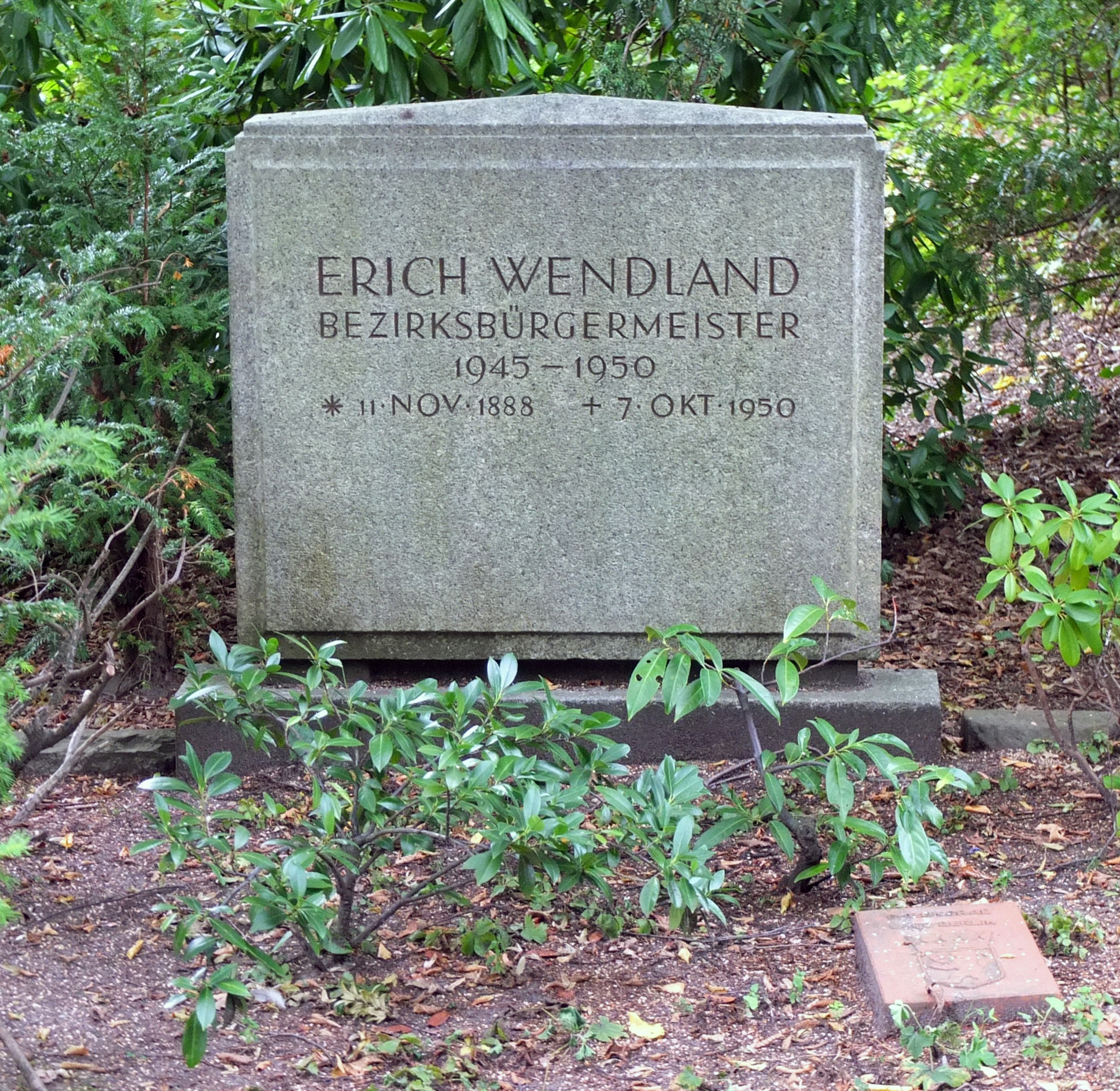 Grab Erich Wendland auf dem Friedhof Eythstraße (Schöneberg II) in Berlin.